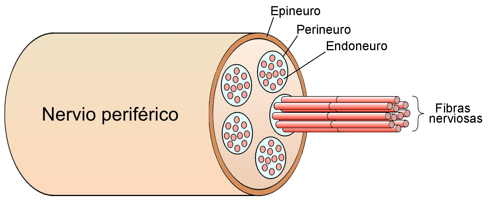 Esquema en el que se representa un nervio periférico. Son visibles las capas que lo componen y las fibras nerviosas.